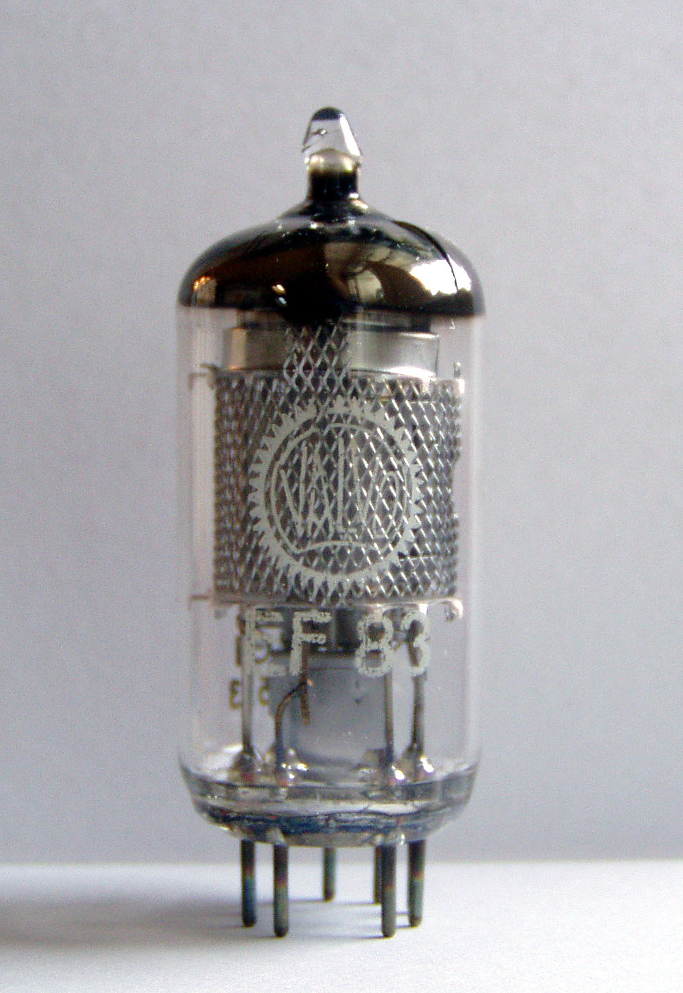 eine EF83 von Valvo